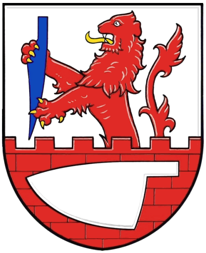 Znak obce Majetín